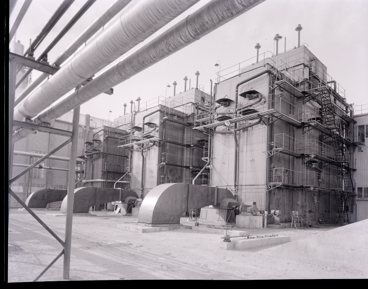 Servizio fotografico : Legnano, 1958 / Paolo Monti. - Buste: 4, Fototipi: 5 : Negativo b/n, gelatina bromuro d'argento/ pellicola ; 10x15. - ((Serie costituita da 4 buste di carta, tenute insieme da una graffetta, identificate con la numerazione: G19922, G19923, G19924, G19925, G19925, G19926, G19927, G19928, G19929, G19930, G19931, G19932, G19933, G19934, G19935, G19936, G19937, G19938, G19939, G19940. - Sulla busta G19797: "Tosi". - Fonte: Agenda di Paolo Monti: Foto Leica 1 / 1-51 verde, 1-110 nera (1958-1963), presso Archivio Paolo Monti